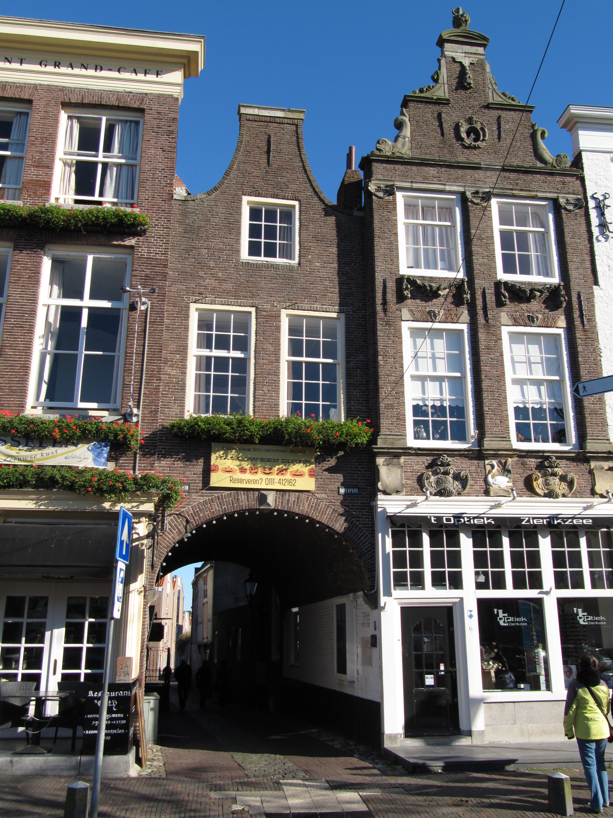 Zierikzee - Havenplein (poortgebouw).jpg